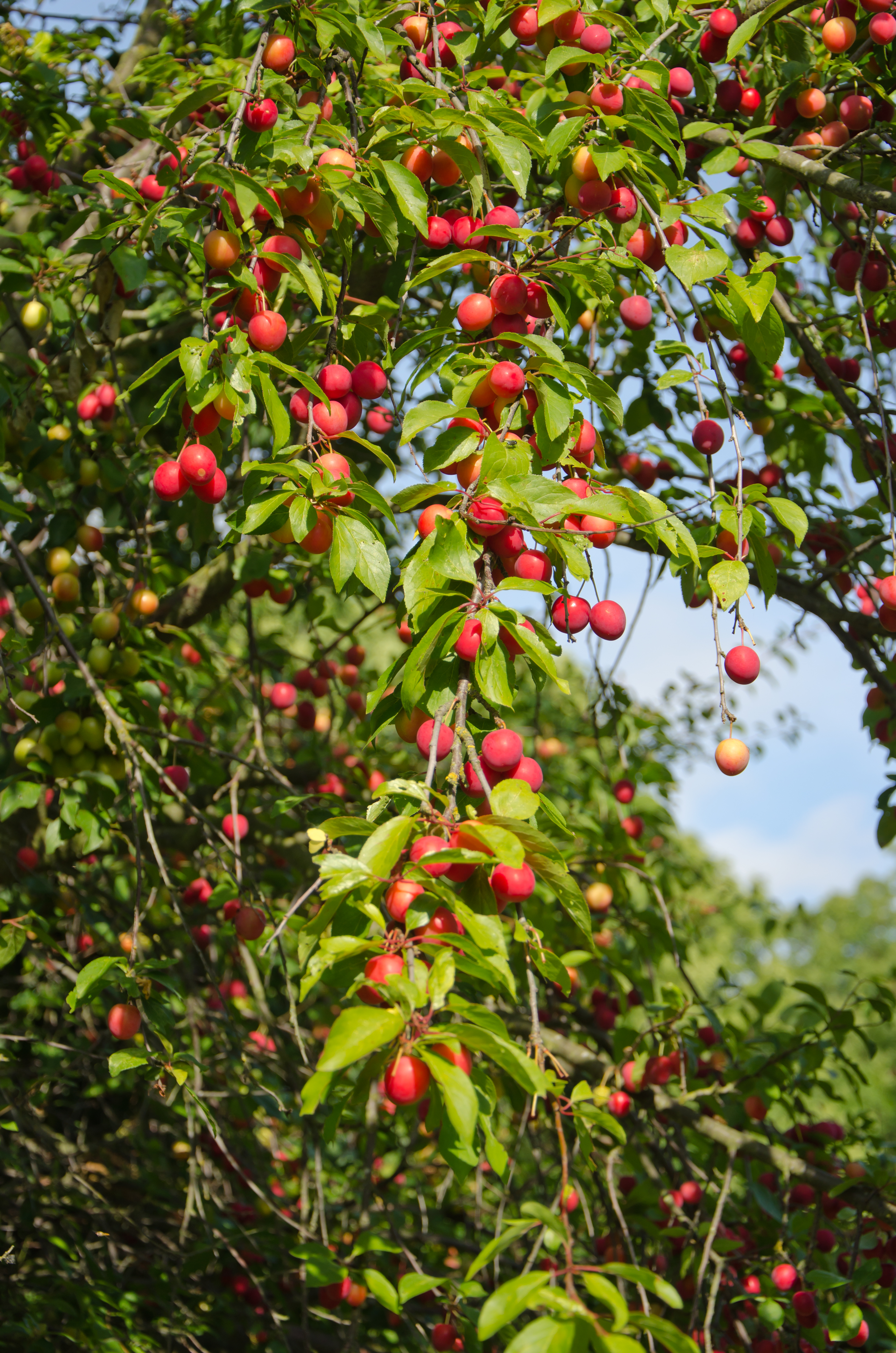 Wildpflaume